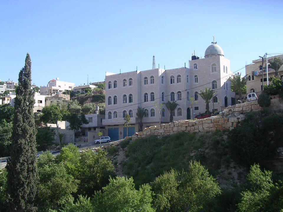 صورة لدار القرآن الكريم في قبلان